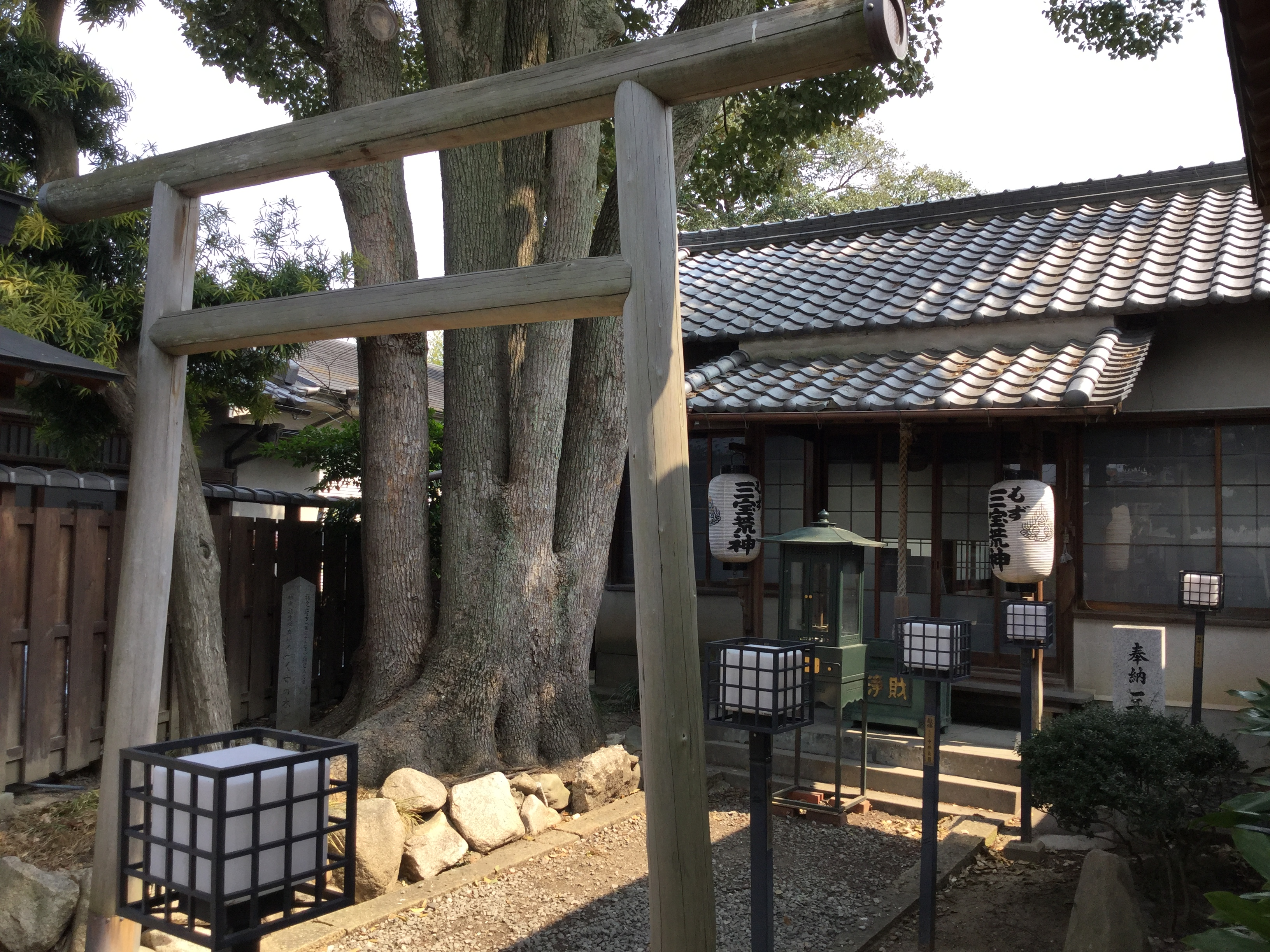 堺市にある万代寺境内の三宝荒神